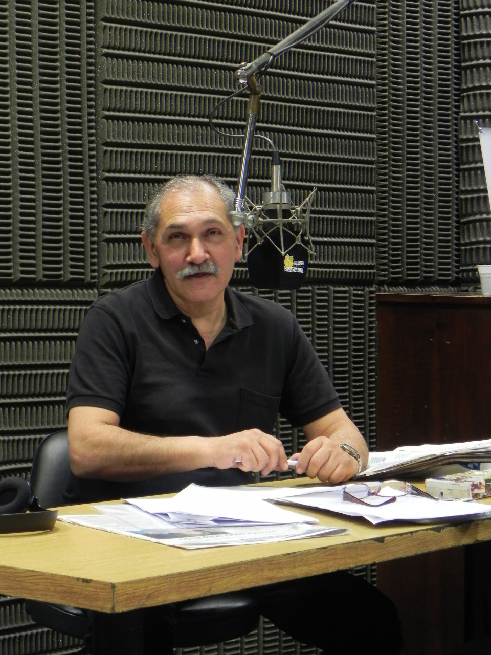 El inolvidable locutor